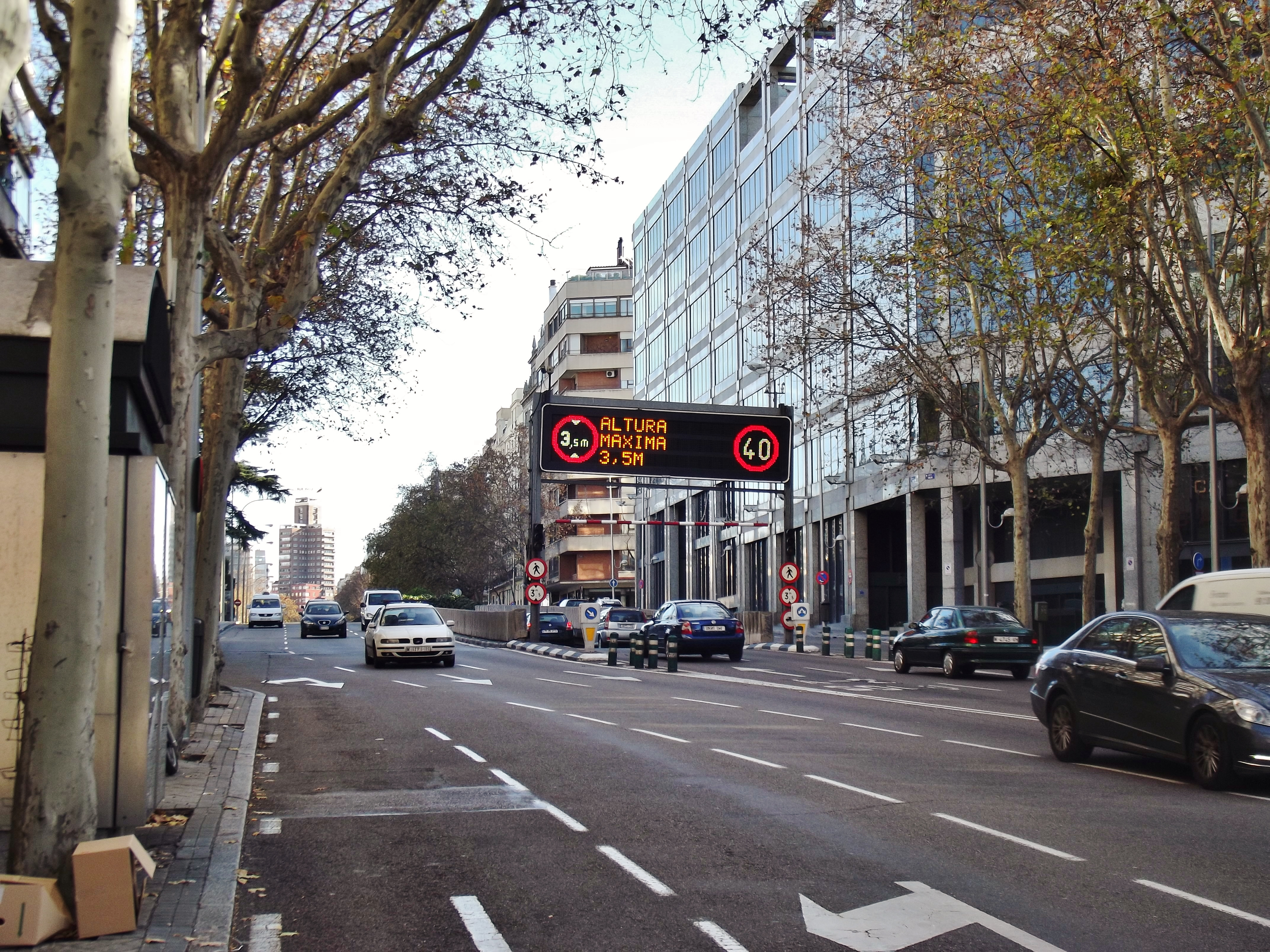 Calle de María de Molina, Madrid. This is a retouched picture, which means that it has been digitally altered from its original version. Modifications: Hidden car plates.